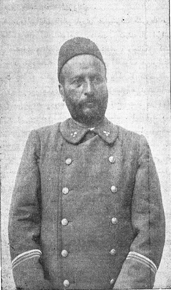 کربلایی علی موسیو